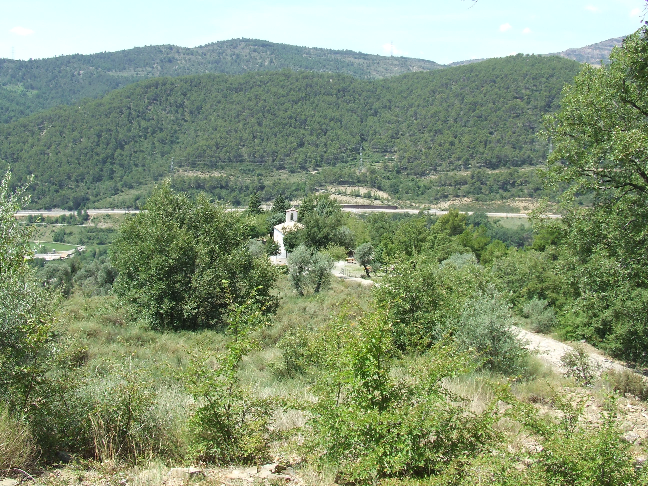 Església vella de Sant Miquel del Pui (la Pobla de Segur, Pallars Jussà)